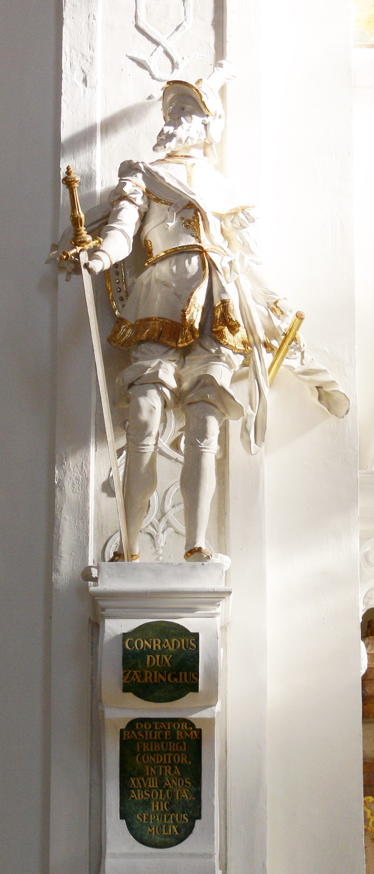 Pfarrkirche St. Peter (ehem. Klosterkirche St. Peter auf dem Schwarzwald) Joseph Anton Feuchtmayer: Stifterfigur Konrad I. von Zähringen, im Langhaus, 1731 Joseph Anton Feuchtmayer (1696–1770) Description German sculptor Date of birth/death6 March 16962 January 1770Location of birth/deathLinzMimmenhausen bei Salem (Baden)Work locationOberschwabenAuthority control VIAF: 69721226 LCCN: n84189350 GND: 118532707 ULAN: 500032217 ISNI: 0000 0000 6678 5681 WorldCat WP-Person